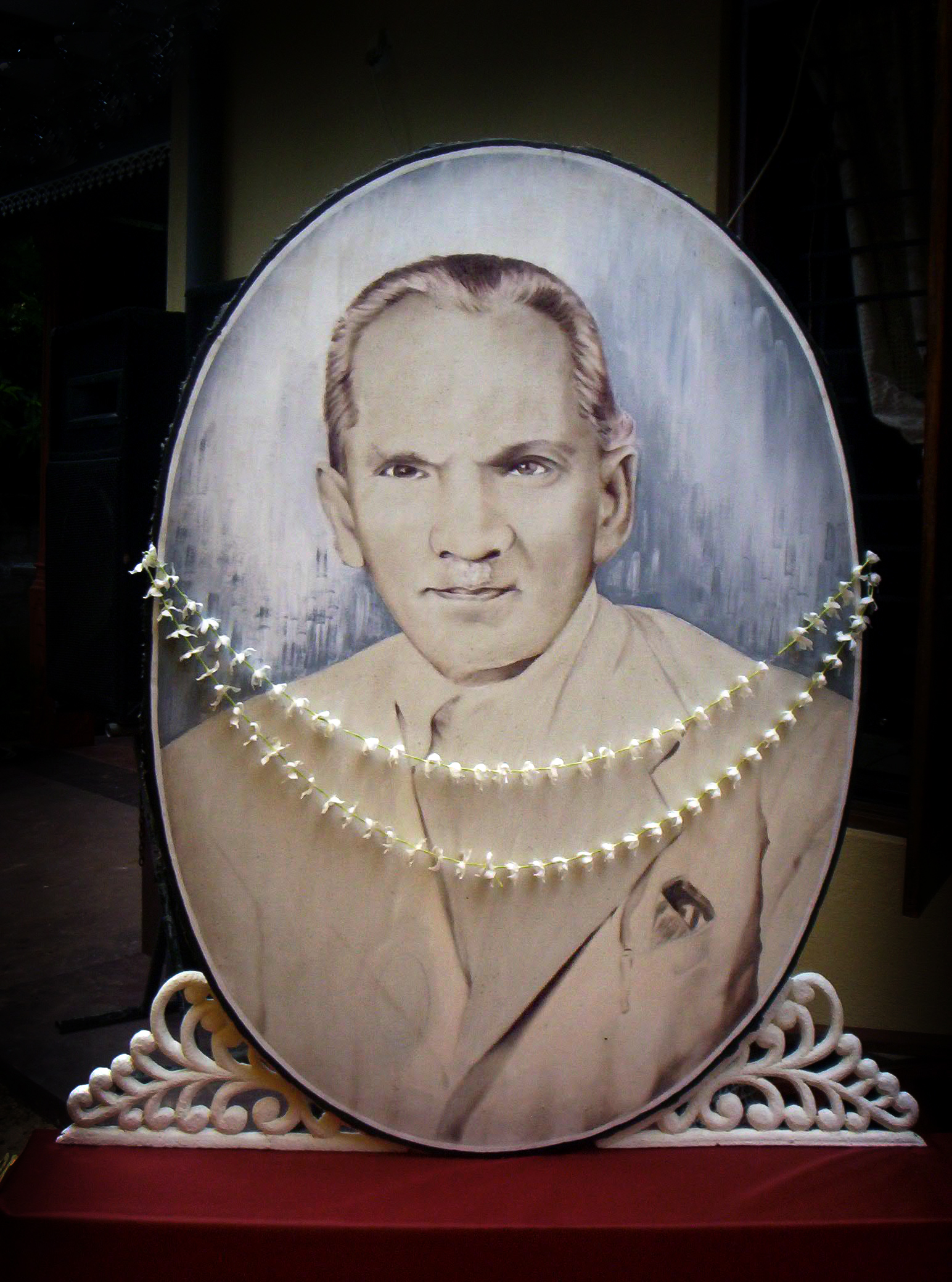 සිංහල: රුහුණු නැටුම් කලායතනයේ අධ්‍යක්‍ෂවරයා ලෙස ද රජයේ කලා උපදේශකයකු ලෙස ද නැටුම් උපදේශකයකු ලෙස ද අසීමිත සේවයක්‌ කළ ටුක්‌කා වඩු ගුණදාස ගුරුතුමාණෝ 1961 වසරේදී ලංකා කලා මණ්‌ඩලය හරහා තම පරපුරට අයත් කෝලම් මුහුණු 64 ක්‌ ජාතික කෞතුකාගාරයට පරිත්‍යාග කළේය.